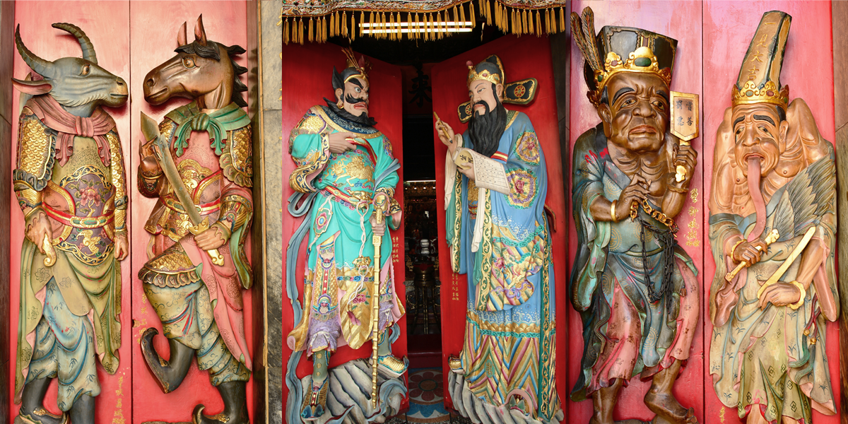 中文（台灣）: 屏東東港東福殿城隍廟的廟門立體浮雕門神